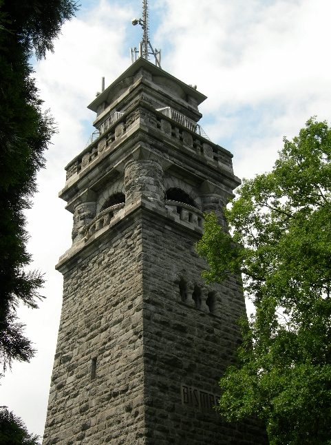 Bismarckturm Langenberg, Velbert